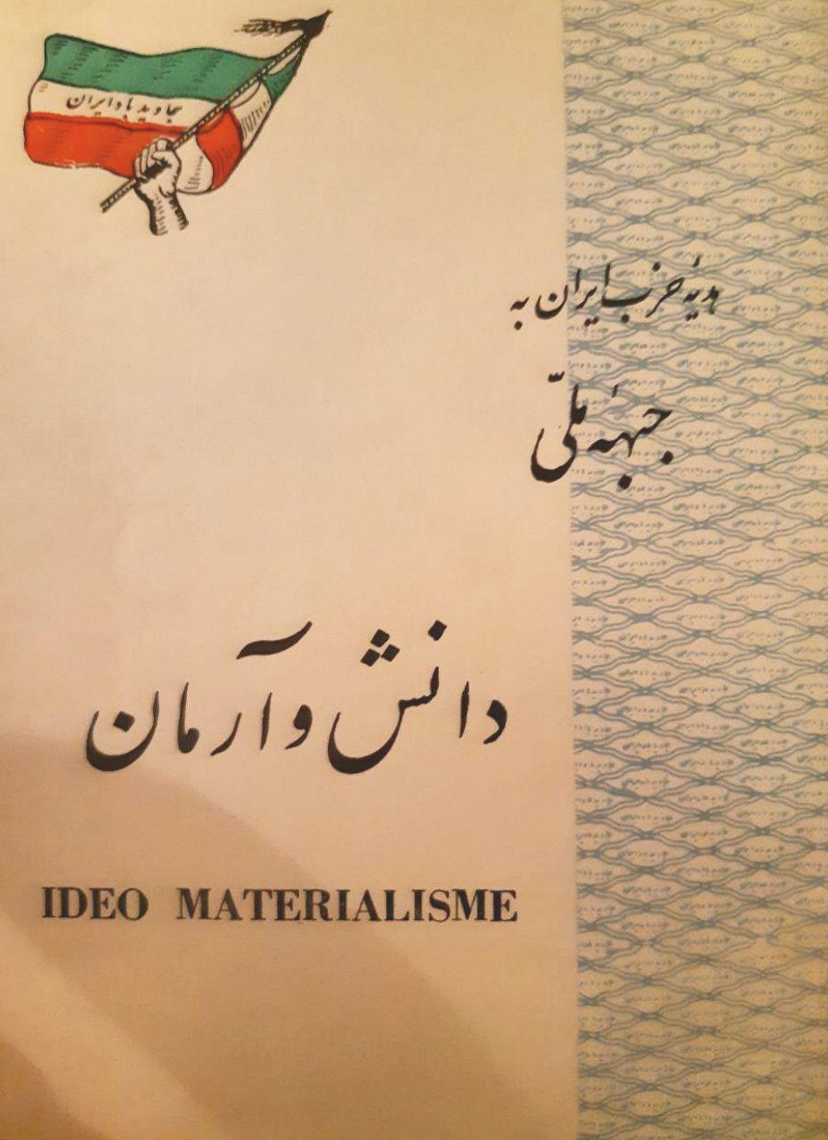 دانش و آرمان، هدیۀ حزب ایران به جبهۀ ملّی ایران